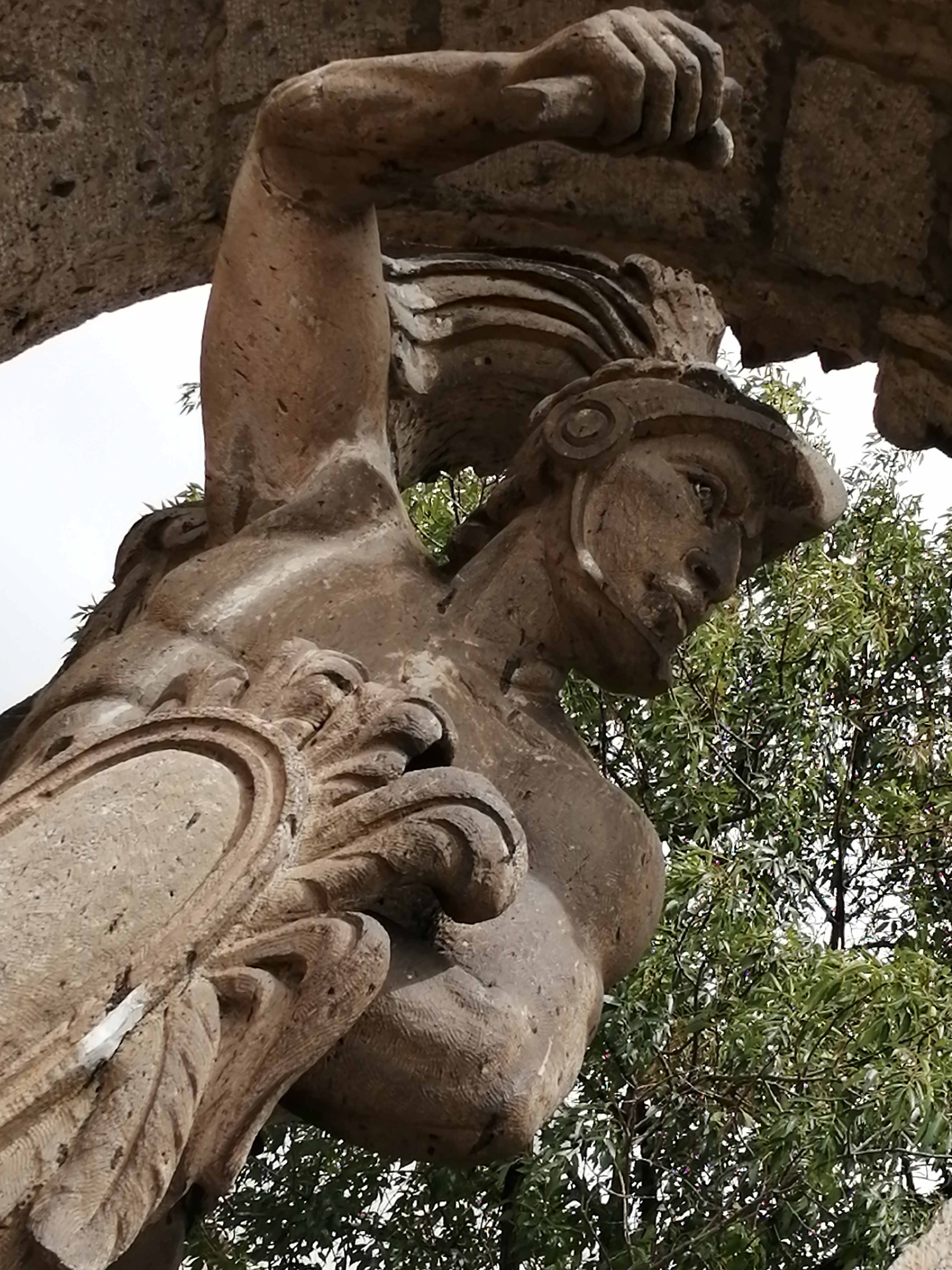 Arco de Ingreso de Zapopan.